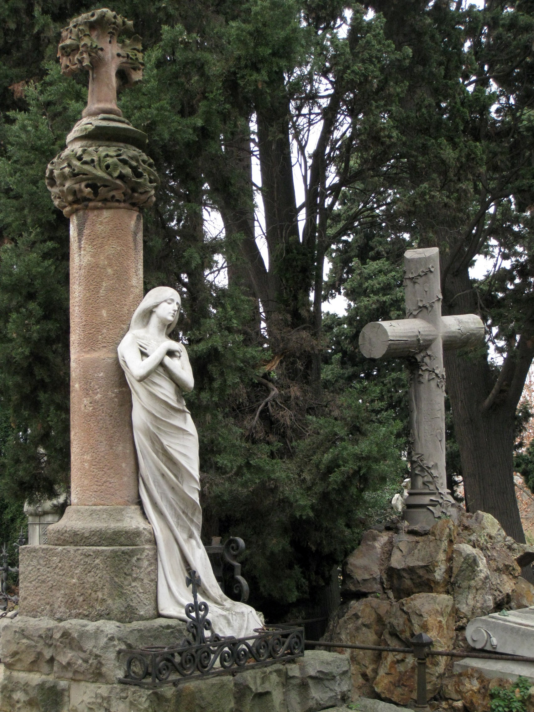 Cementiri de Montjuïc (Barcelona) Object location41° 21′ 09.64″ N, 2° 09′ 08.73″ E